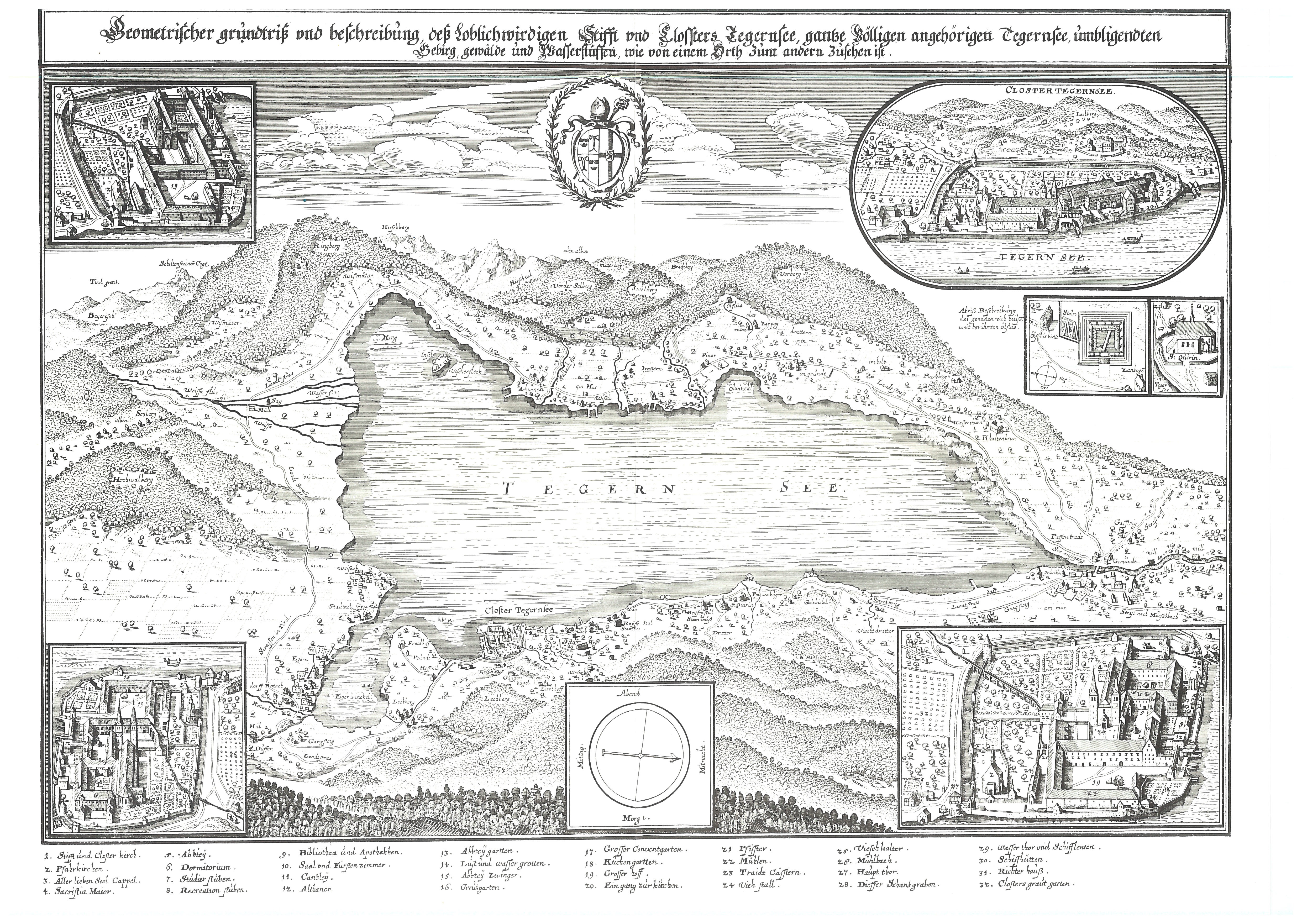 Kupferstich von Matthäus Merian vom Tegernsee und Kloster TegernseeGeometriſcher grunddtriß und beschreibung des Loblichwirdigen Stifft und Cloſſters Tegernſee gantze Völligen angehörigen Tegernſee, umbliegenden Gebirg, gewälde, und Waſſerflüſſen, wie von einem Orth Zum andern Zusehen iſt.Ca. 29,5 cm x 40 cm. Ansicht des Tegernsees aus der Vogelschau mit genauen Angaben der umgebenden Ortschaften, Straßen und Berge und vier Ansichten des Klosters in den Bildecken. Scan mit 300 dpi auf A3.